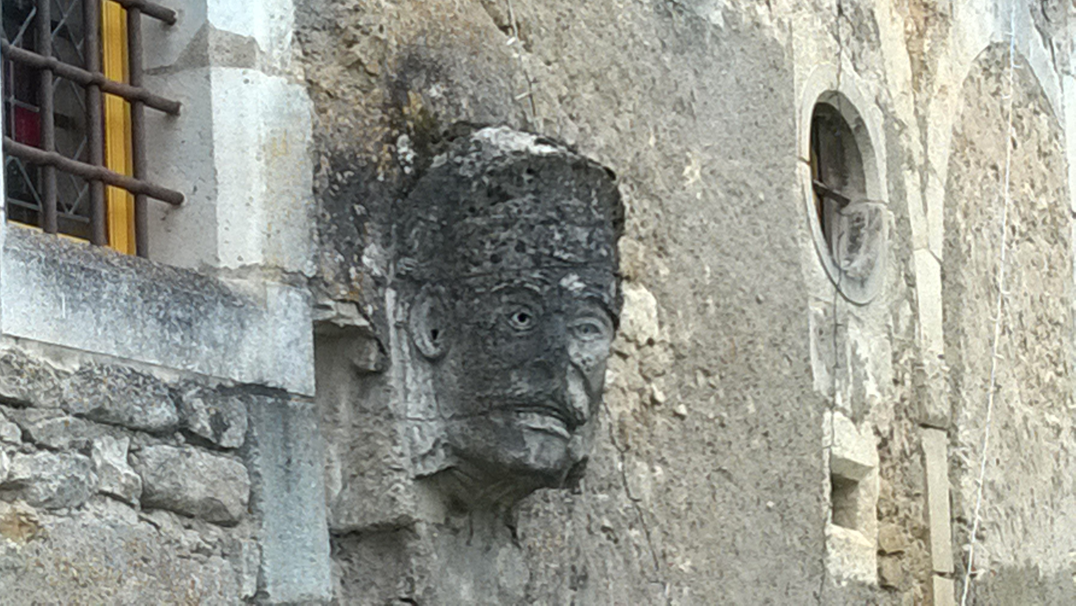 Manoir de Sexey-aux-Forgesporche, cheminée, élévation, escalier, toiture, décor intérieur Sculpture dite Grigne Dents .